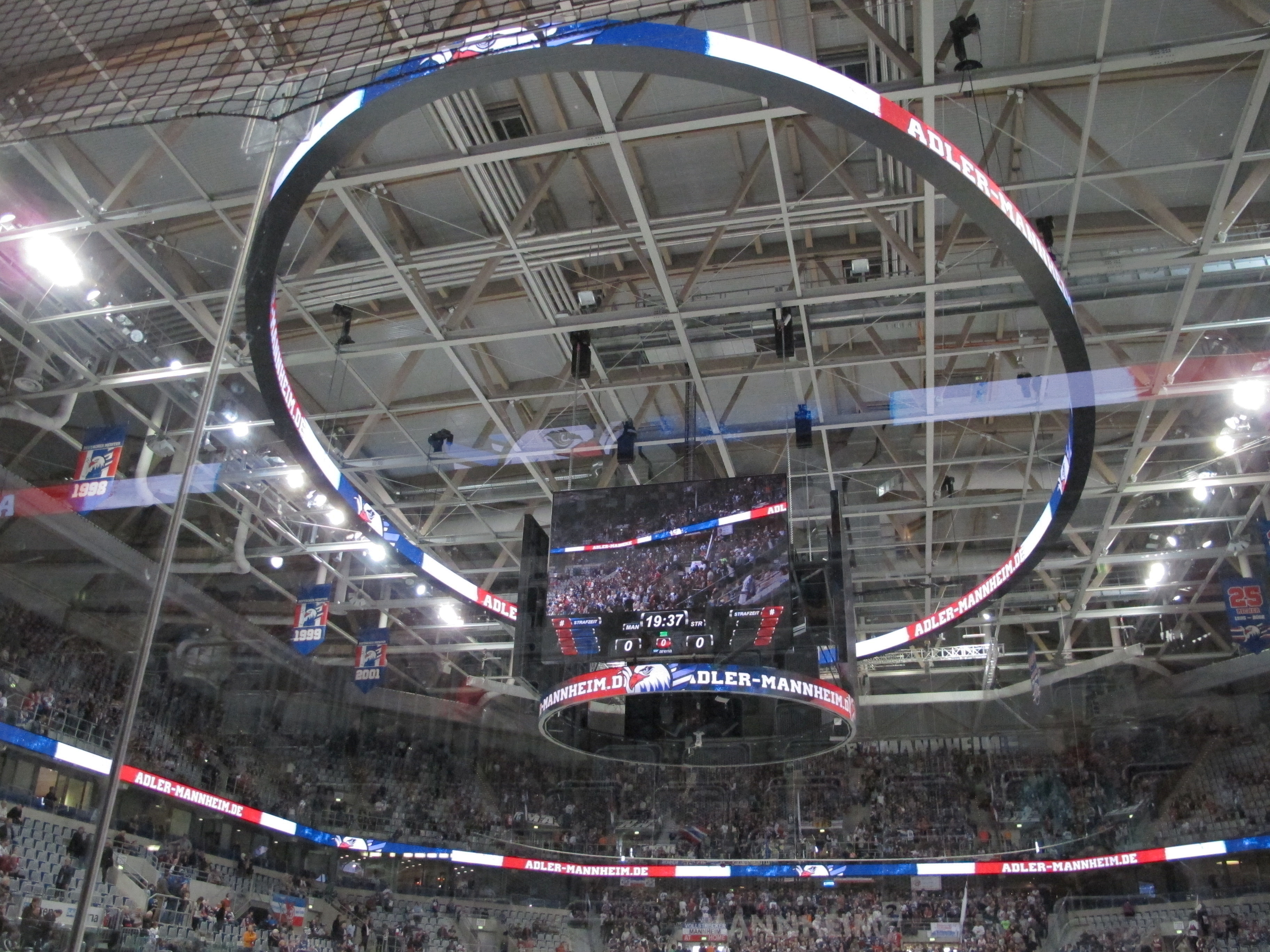 SAP-Arena Mannheim, Video